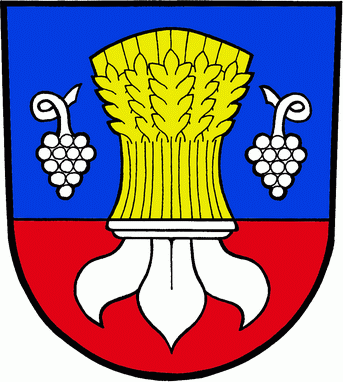 znak obce Sušice, okres Uherské Hradiště